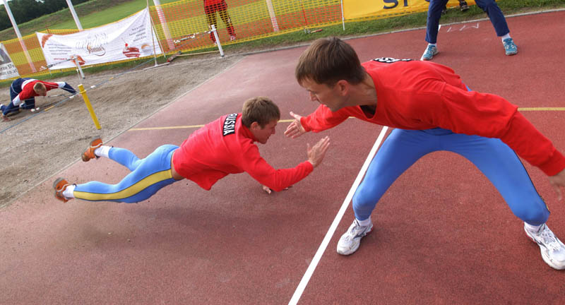 Militärischer Fünfkampf Hindernisbahn-Staffellauf Team Russland